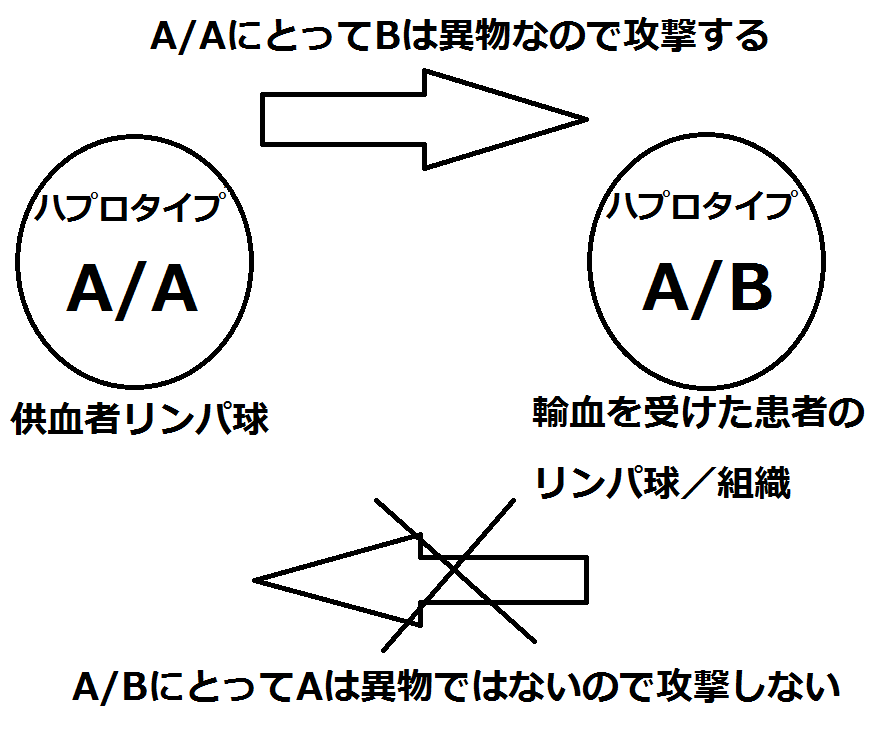 輸血後GVHDがおきる機序の図化